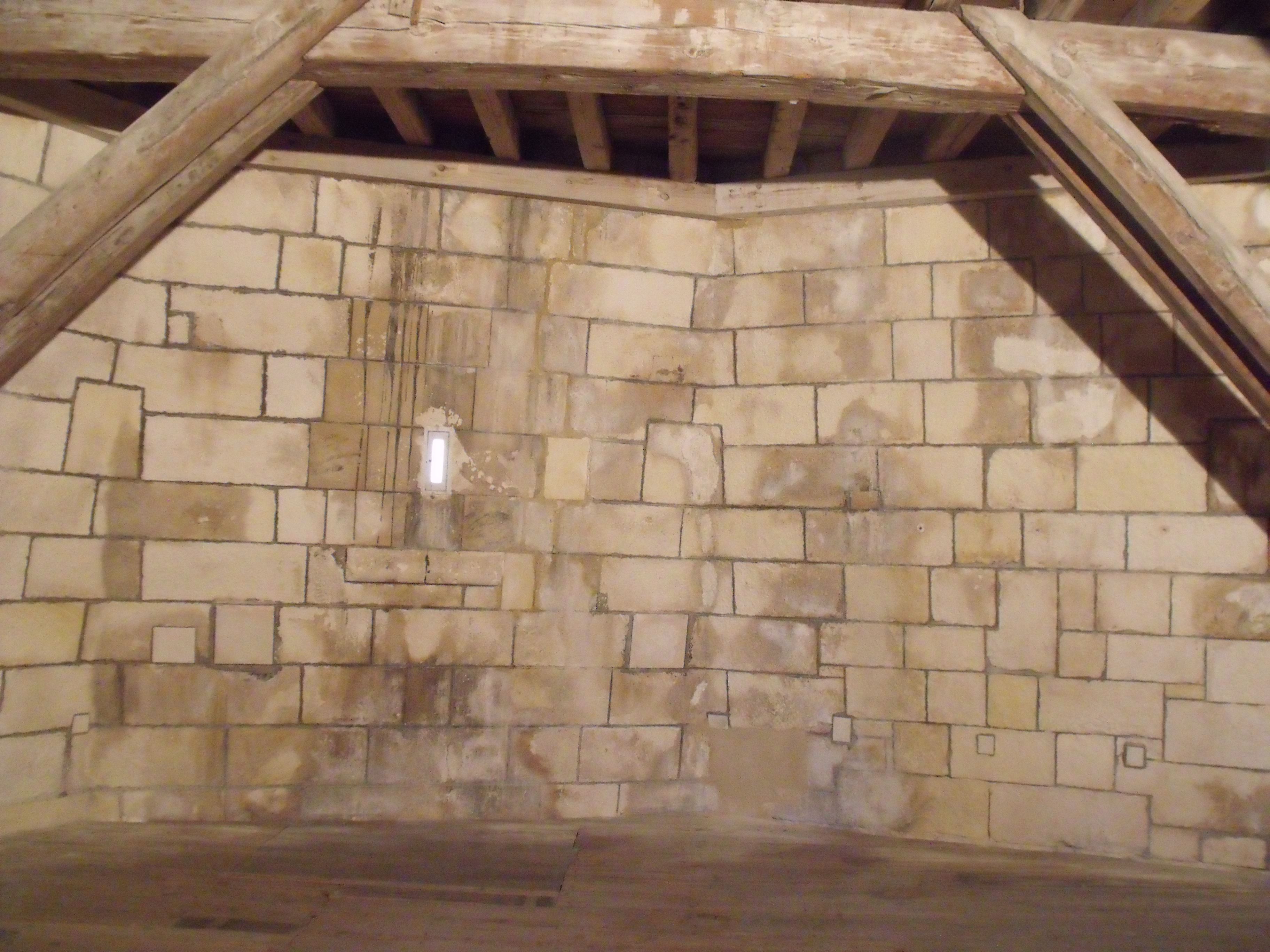 Interior de la torre de la Linterna, en La Rochela. .